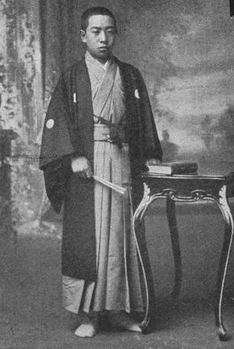 茂木佐平治（九代目） 亀甲萬印醤油醸造（現・キッコーマン）業主。1891年生まれ。先代の次男で幼名・文吉